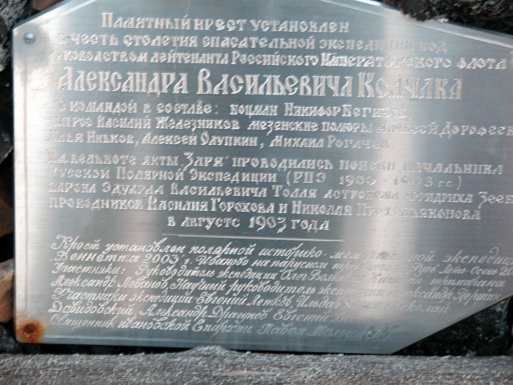 Крест, установленный в 2003 г. в память о спасательной экспедиции Колчака